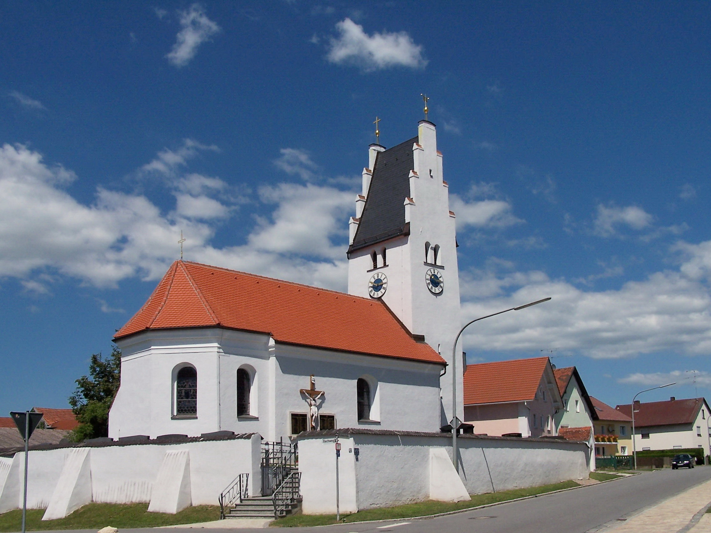 Mintraching, Sengkofen. Katholische Filialkirche St. Jakob, Saalbau mit eingezogenem Chor und Ostturm mit Treppengiebel, 1741-48, Turm wohl 17. Jahrhundert.